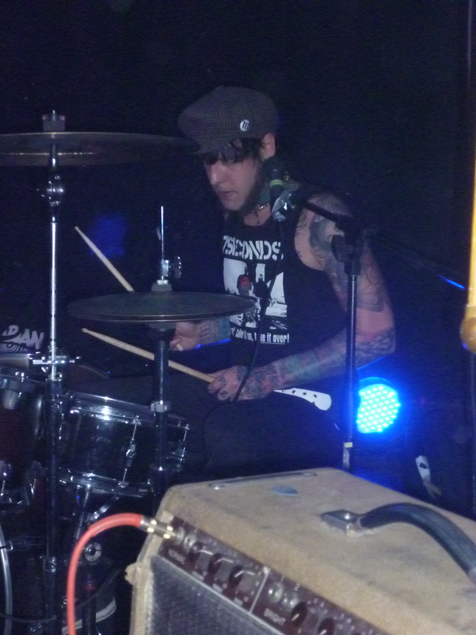 Christopher „Baku“ Kohl mit Kotzreiz beim This is for the Kids 2013